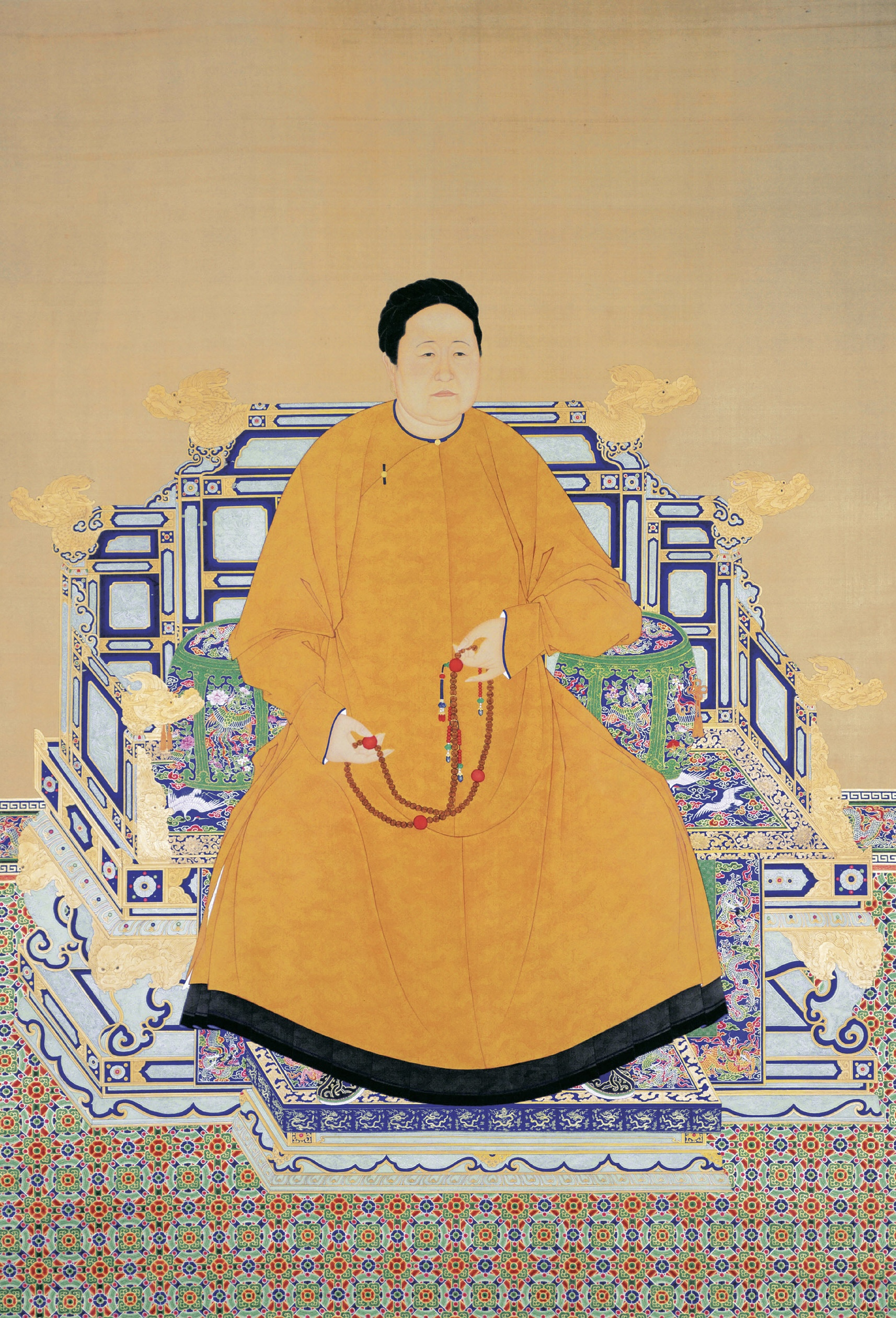 孝庄文皇后便服像